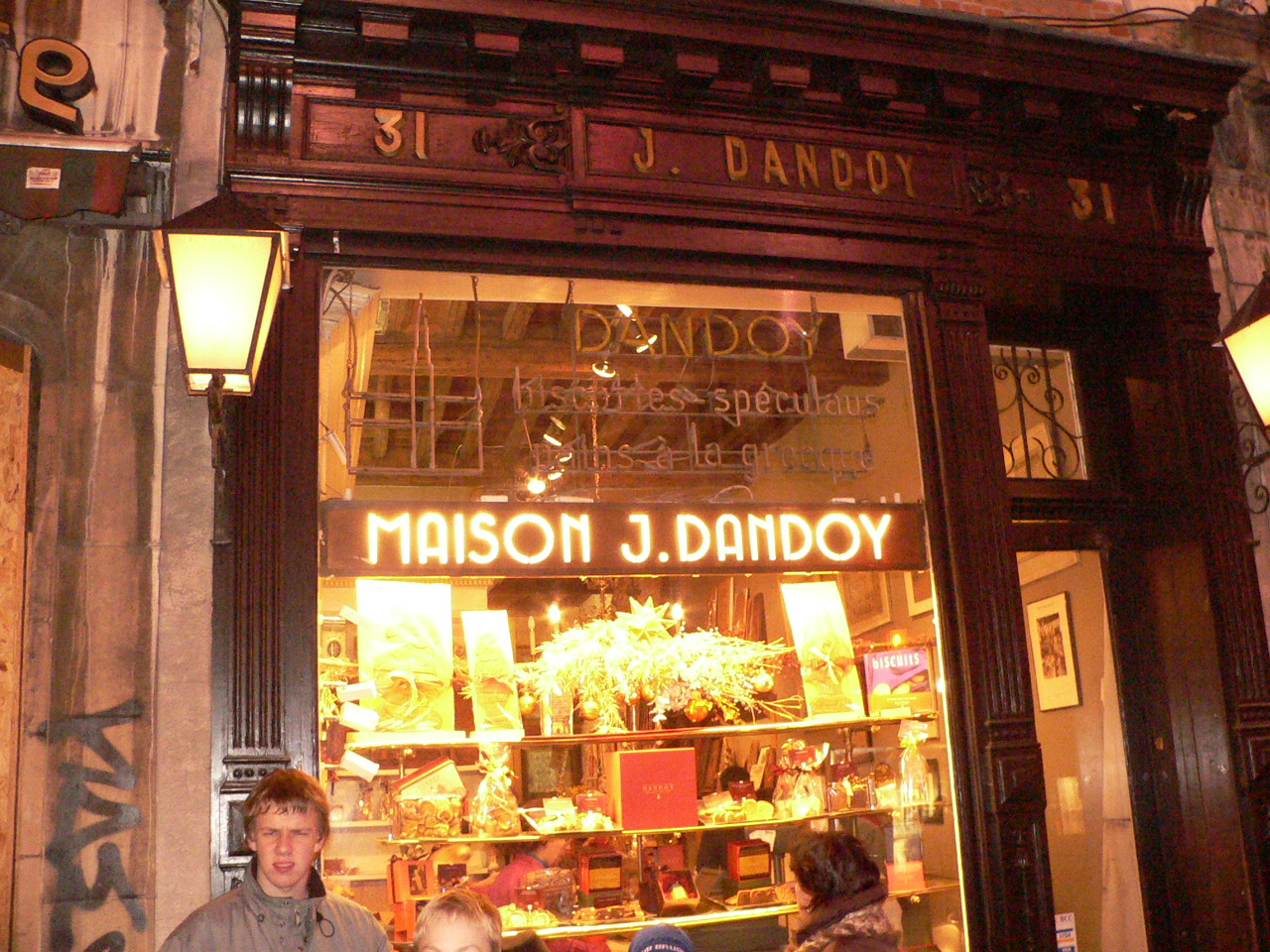 Maison Dandoy, l'un des plus vieux fournisseur en speculoos, pain à la grecque,...à Bruxelles Photo personnelle de Poulsen, moi, auteur de cette photo Donne toutes les permissions requises à la diffusion ici et sur Wikipedia...photo entièrement libre